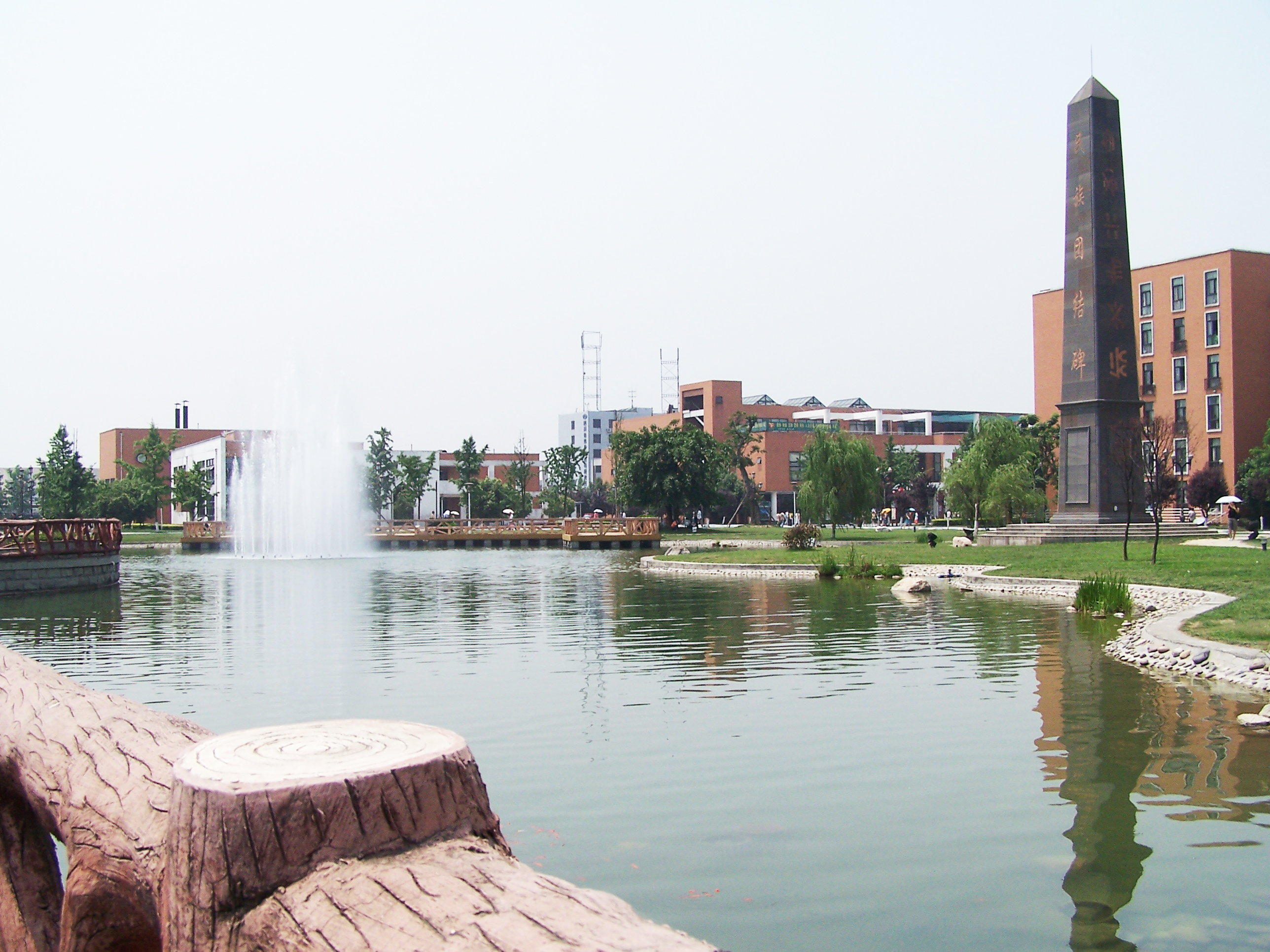 西南民族大学新校区的民族团结纪念碑